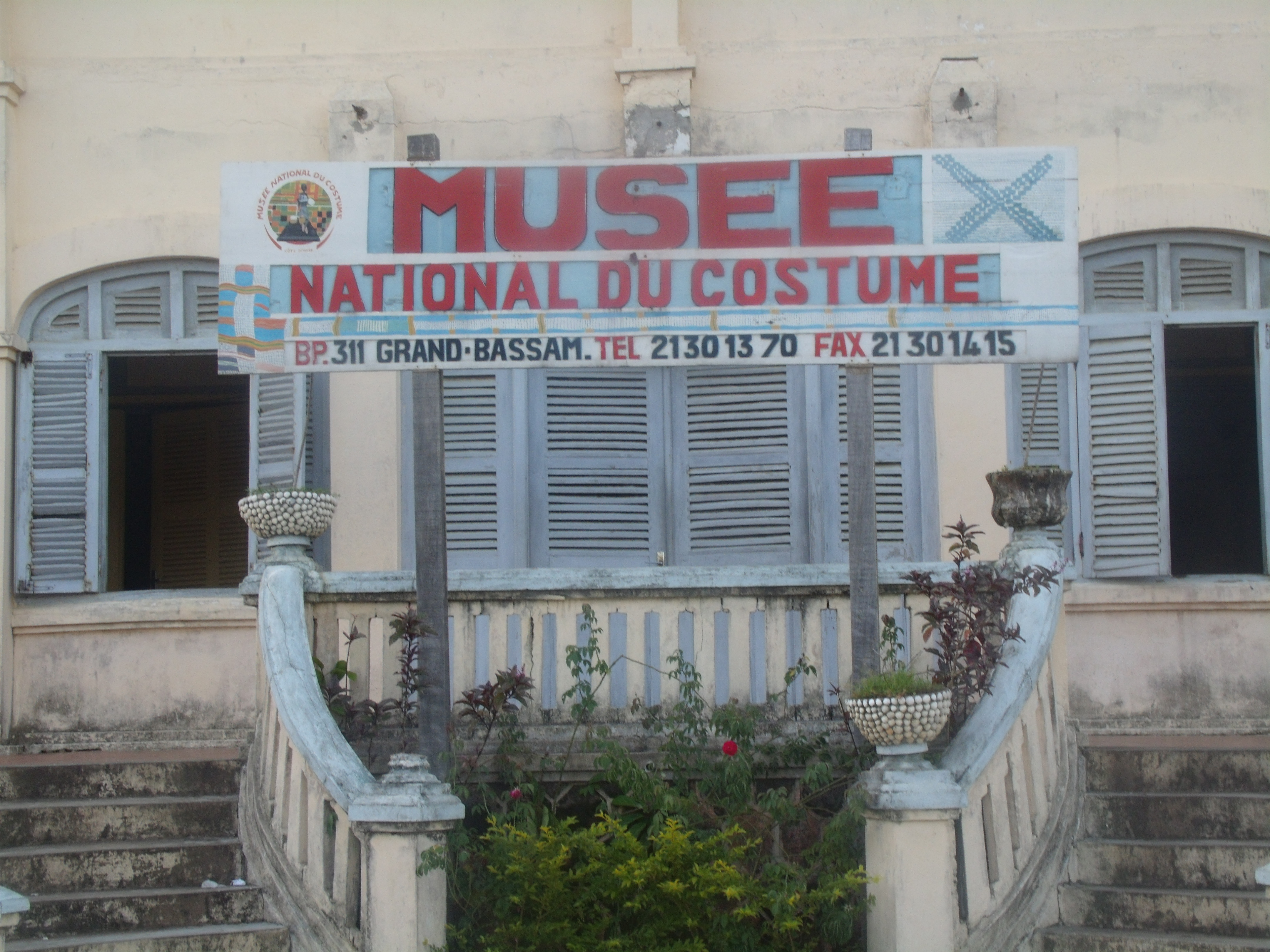 Musée dédié au costumes et tenues traditionnelles de la Côte d'Ivoire.